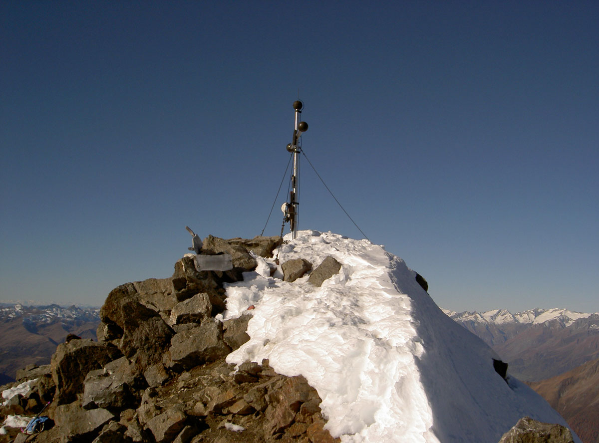 Gipfelkreuz am Hochschober 3240 m in der Schobergruppe (Ostalpen)